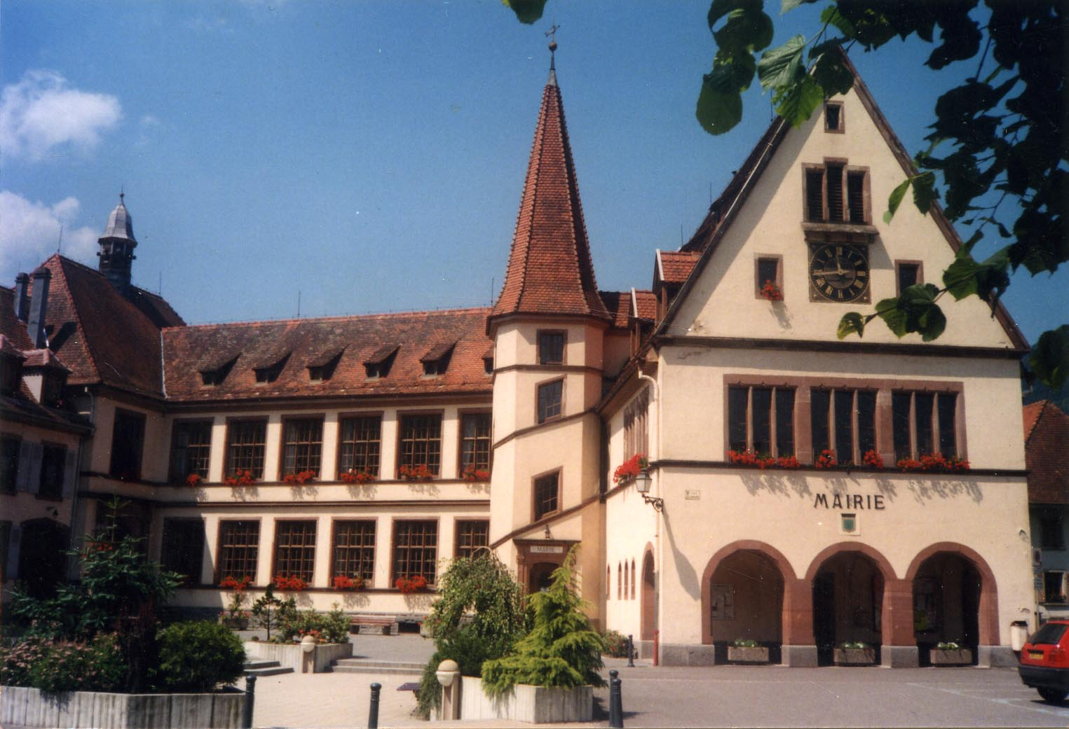 La Mairie de Metzeral. Photo : Samuel Wernain (2005).